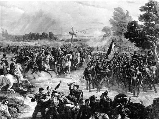 Battle in Goito 1848 Prima guerra di indipendenza italiana